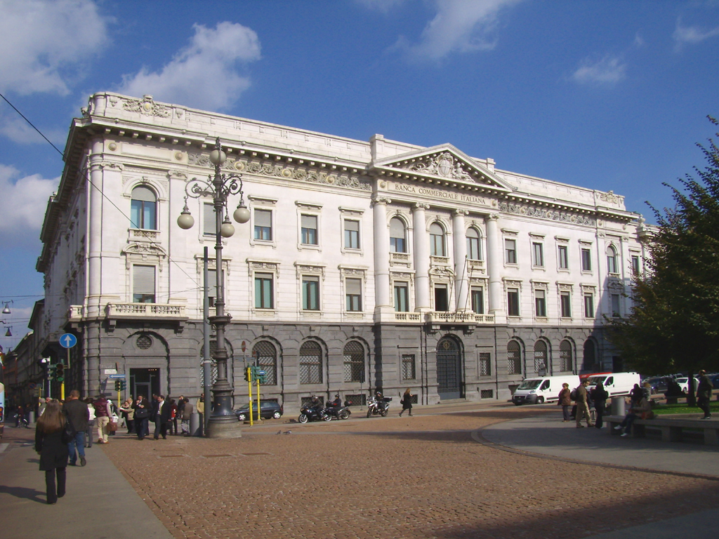 Palazzo della Banca Commerciale in piazza della Scala a Milano